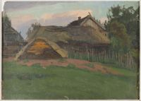 Картина російського художника Скліфосовського Миколи Васильовича (це не відомий медик, а його повний тезка).